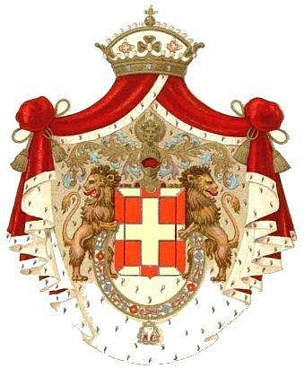 Stemma della Casa Savoia Genova.